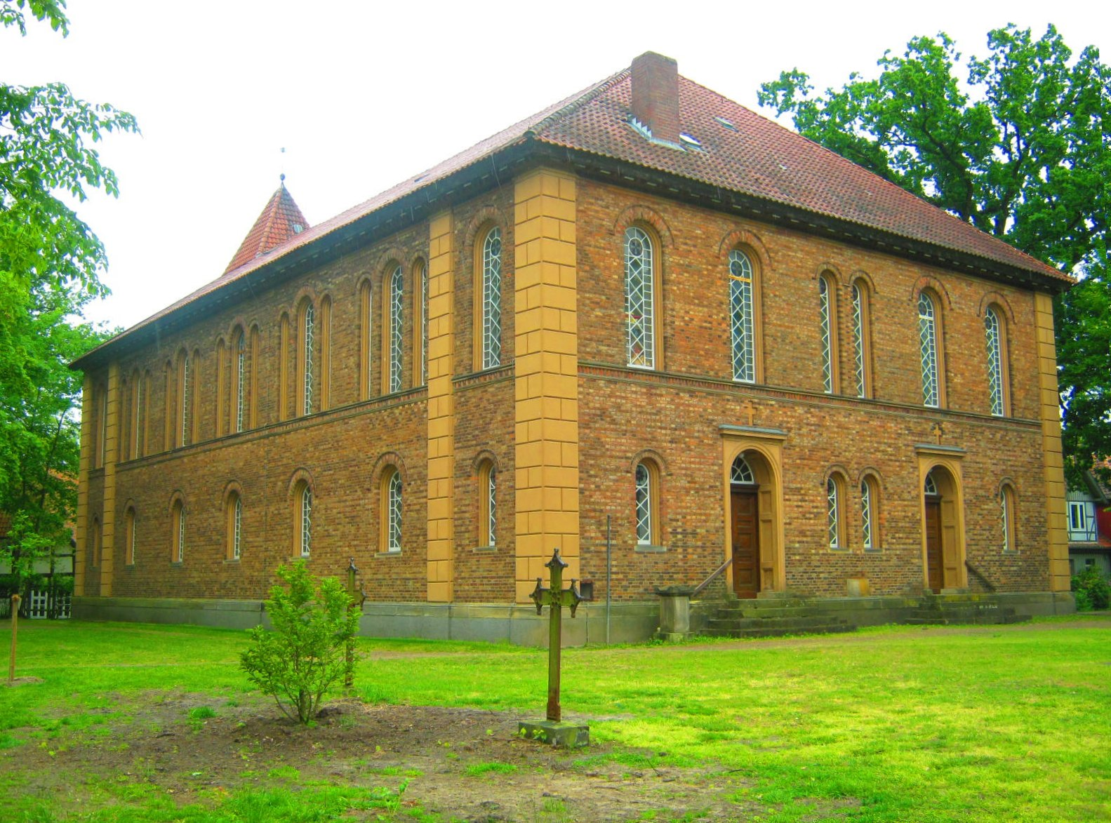 Die Rückseite der St.-Martini-Kirche in Brelingen, Niedersachsen, so wie 1849 neu erbaut.